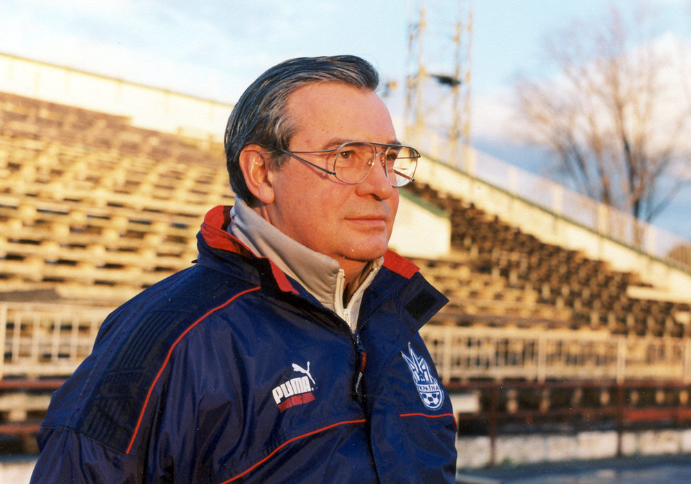 Константин Вихров делегат ФФУ на одном из матчей украинской премьер-лиги. 2007.